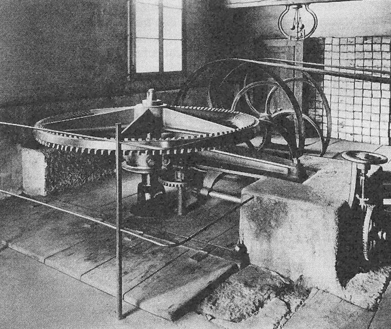 Kegelrad-Getriebe über der Girard-Turbine im Kraftwerk Kriegstetten. Es sind die Riemenantriebe für die beiden Generatoren sichtbar.